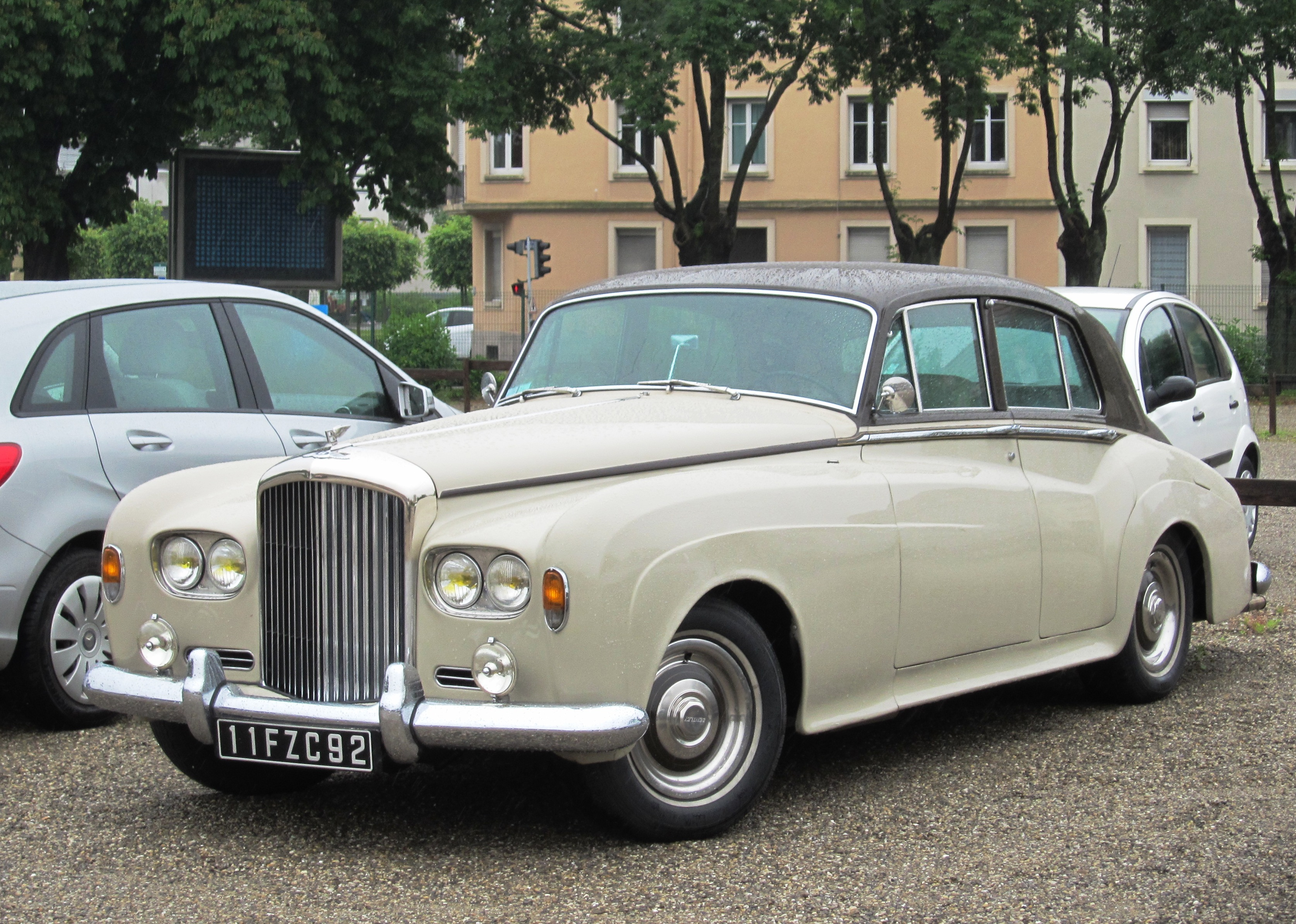 Bentley S3 in the car park of the French National Automobile museum in Mulhouse.